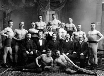 Члены первого русского "Геркулес-клуба",Невский, 98.